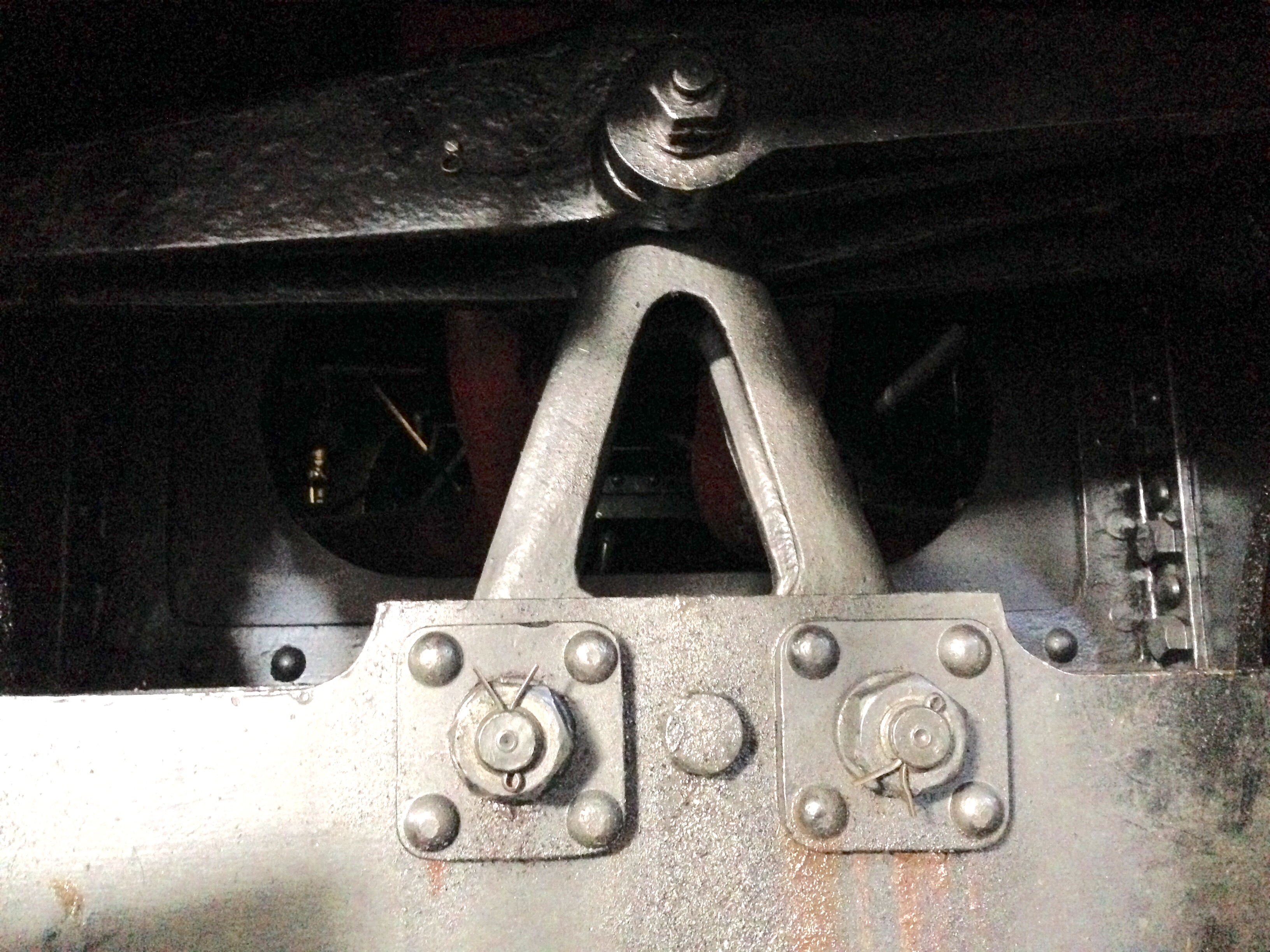 Dampflokomotive der ehemaligen Bern-Schwarzenburg-Bahn Ed 3/4 Nr. 51: Dreieckstelze über der Laufachse (Basis links und rechts in Pfannen gelagert), die einen Waagbalken stützt, an dem wiederum mittels Blattfeder-Paketen der Lokomotivrahmen aufgehängt ist. Wird bei einer Auslenkung der Laufachse diese Dreieckstelze seitlich abgekippt, wirkt sie wegen des darauf lastenden Gewichts als Rückstellvorrichtung.